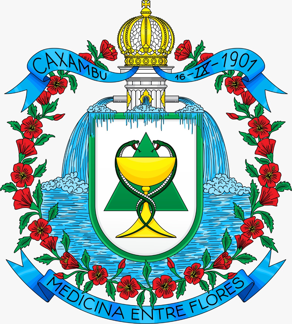 Brasão de Armas do município de Caxambu, Minas Gerais, Brasil